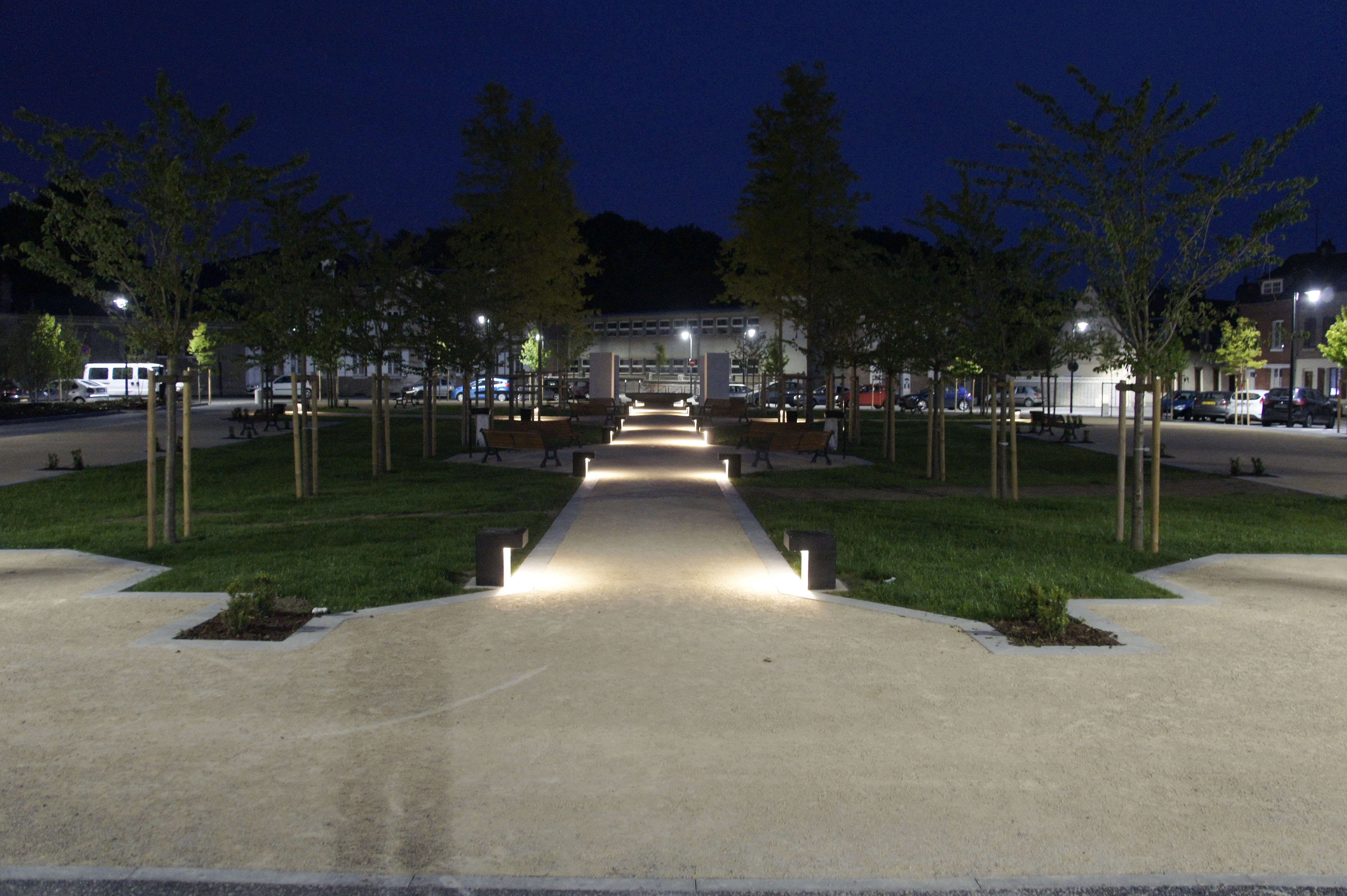 Vue de nuit, réglage de l'éclairage en cours